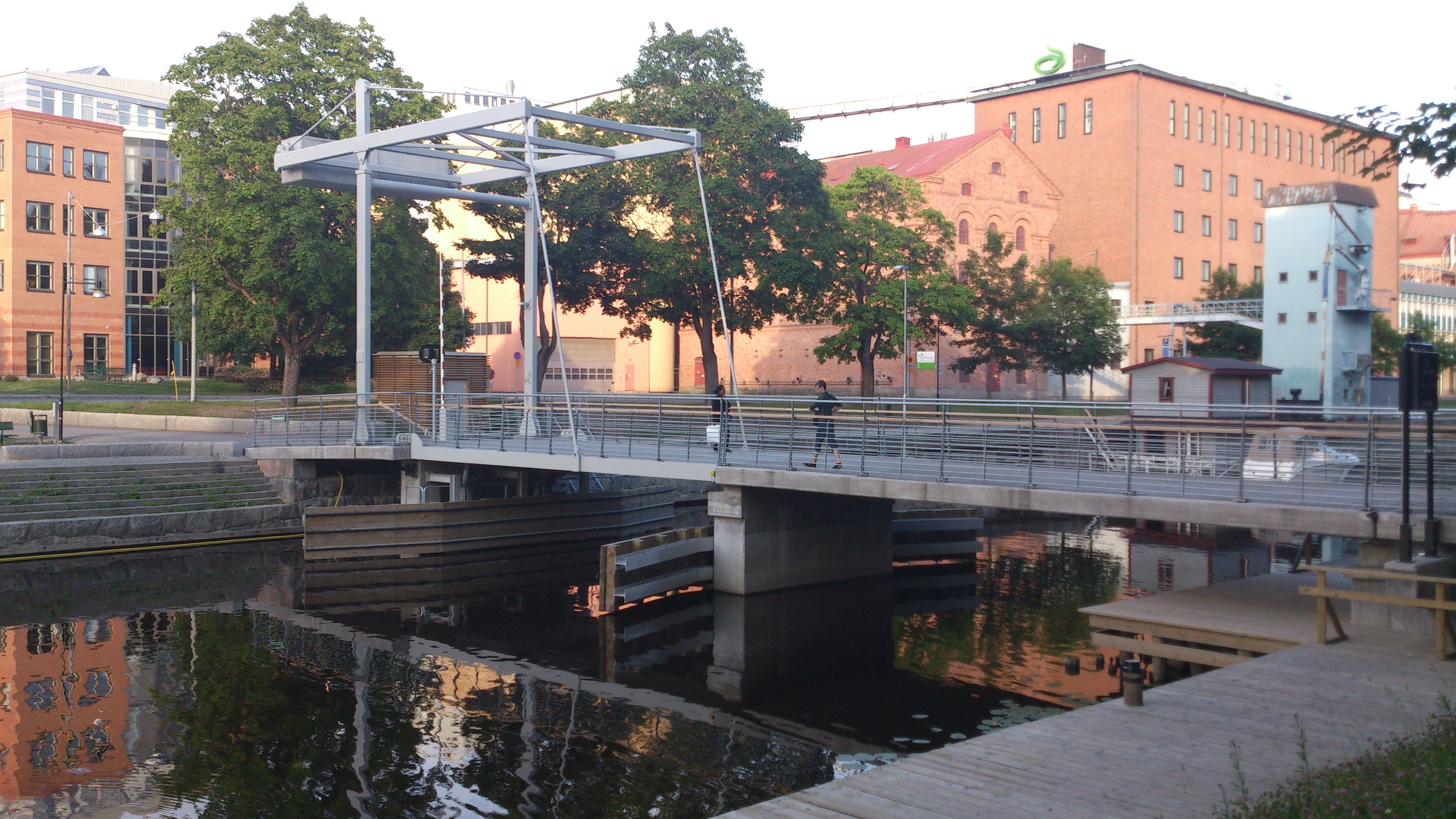 Hamnspången, Uppsala, 2013